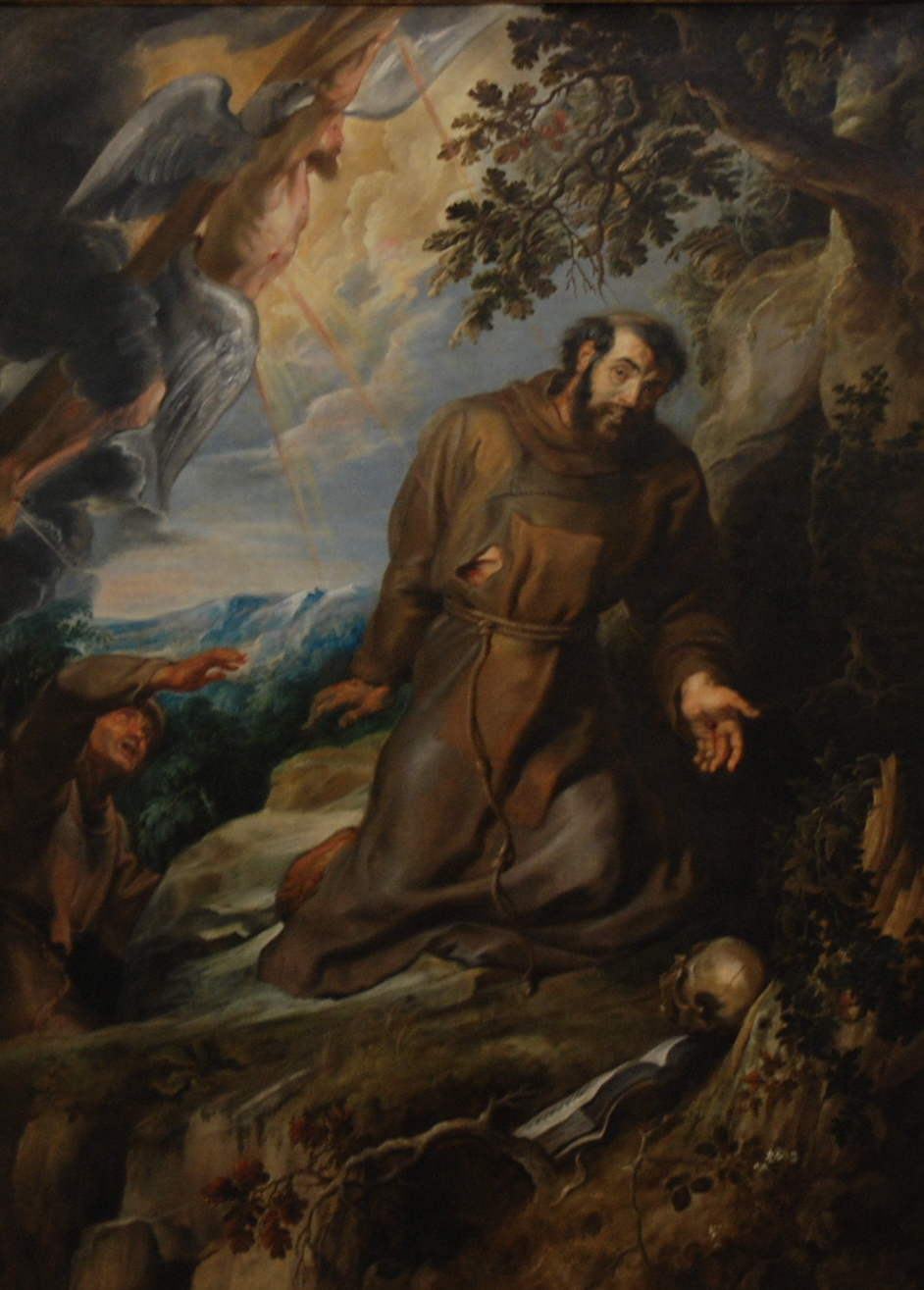 Peter Paul Rubens (1577-1640) - Franciscus van Assisi ontvangt de stigmata - MSK Gent